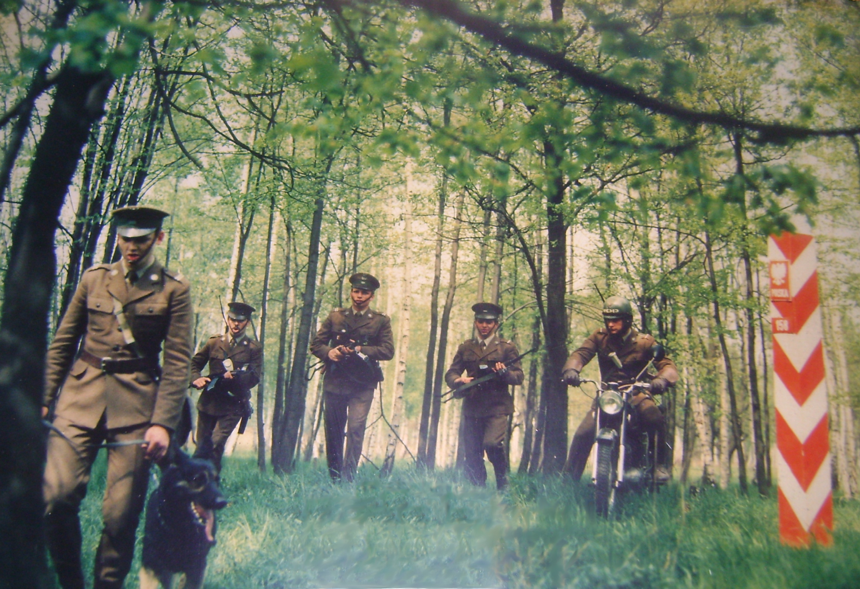 Odbitka ze zdjęcia znajdującego się w Schronisku na Przełęczy Okraj. Żołnierze WOP przy sł. gr. nr 158 na granicy z Niemiecką Republiką Demokratyczną. Odcinek Strażnicy WOP w Pieńsku, Łużycka Brygada WOP.